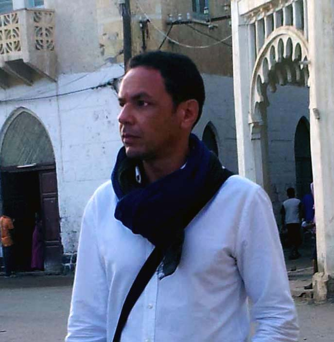 Massawa, 2014